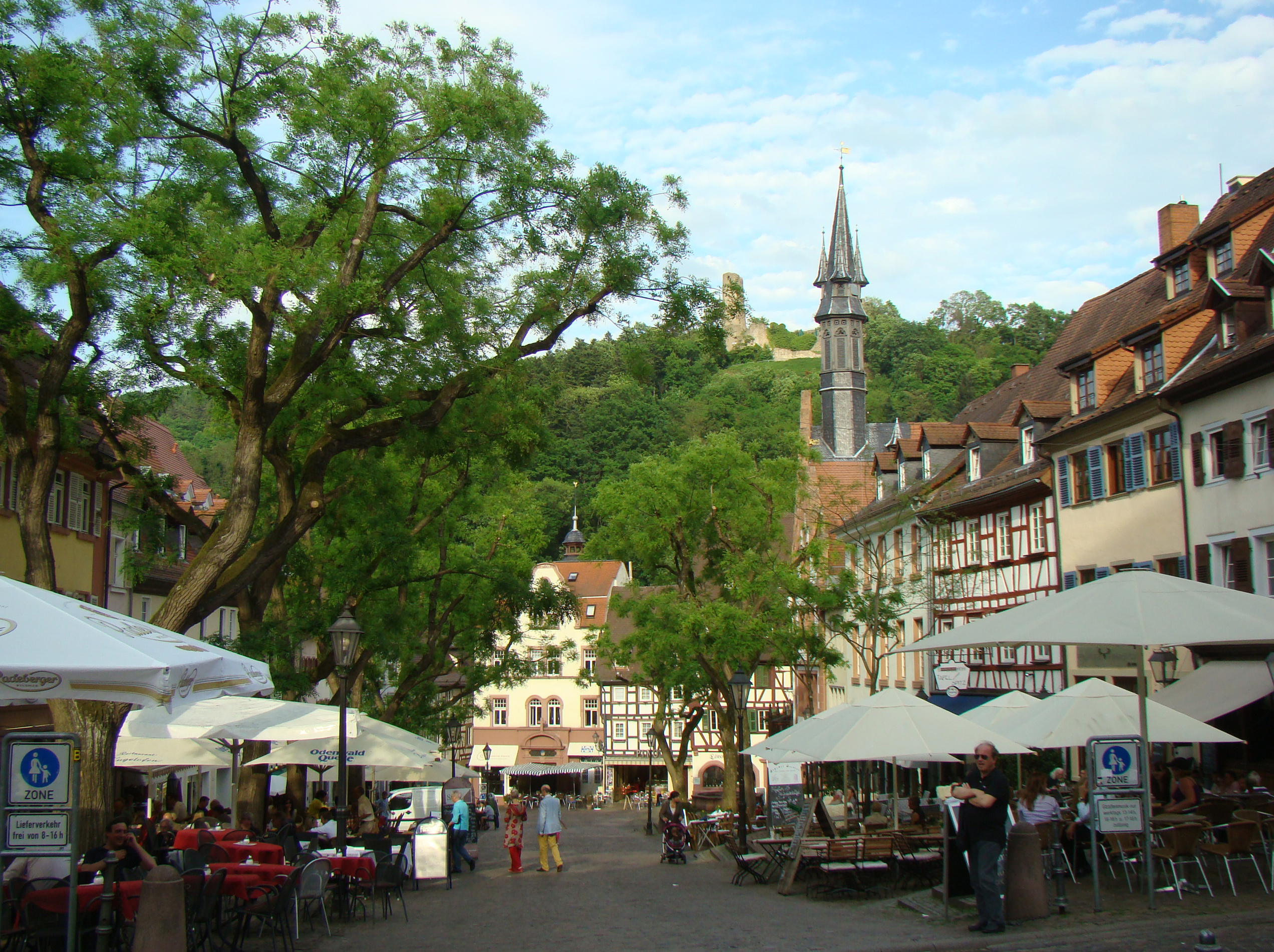 Marktplatz von Weinheim, im Hintergrund Burg Windeck